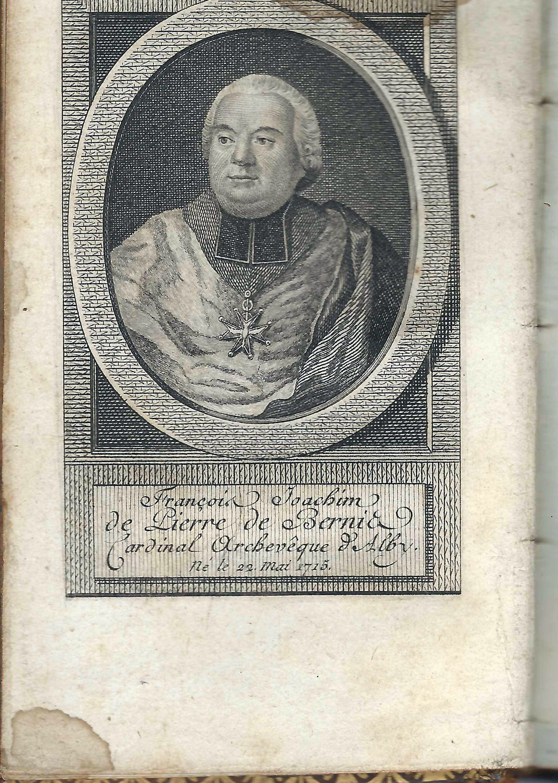 Frontispice des Œuvres Complettes de Mgr le C.de .B***** éditées à Londres en MDCCLXXIX . Scanné par Alain Auzas